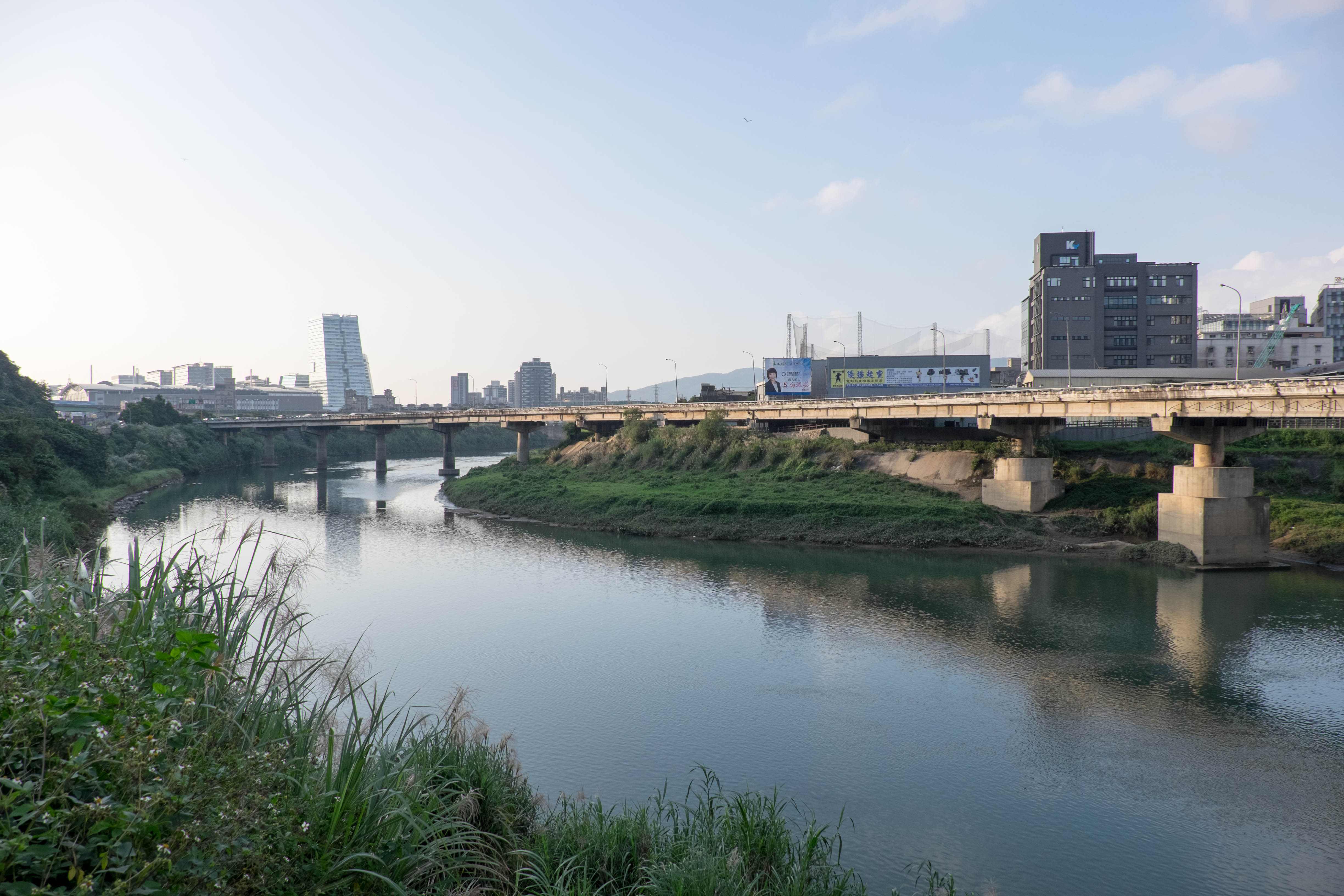 中文（台灣）: 從汐止大同路一段（省道臺5號）北上路段北望北山大橋西段南側。